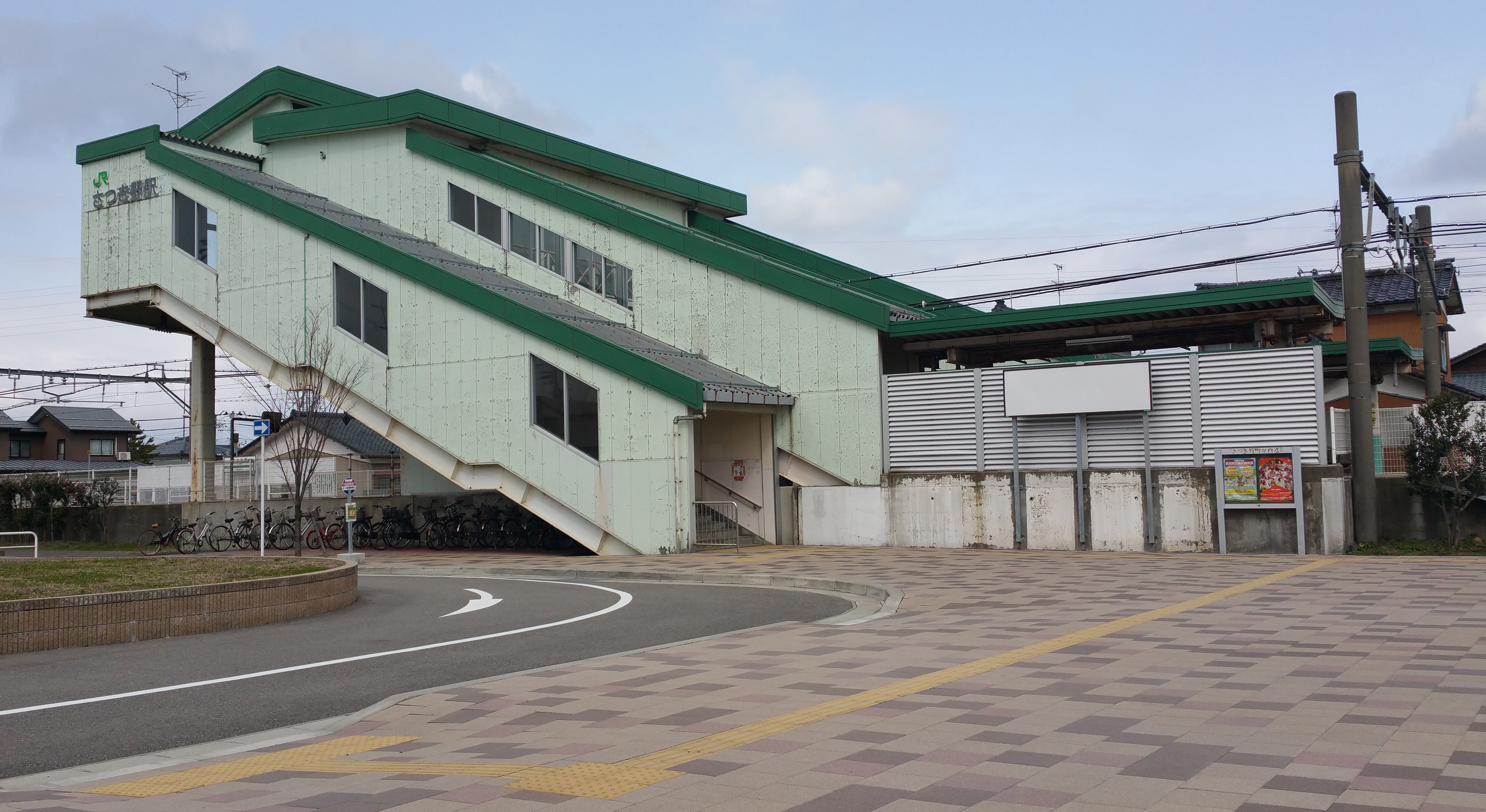 さつき野駅西口（2015年2月）